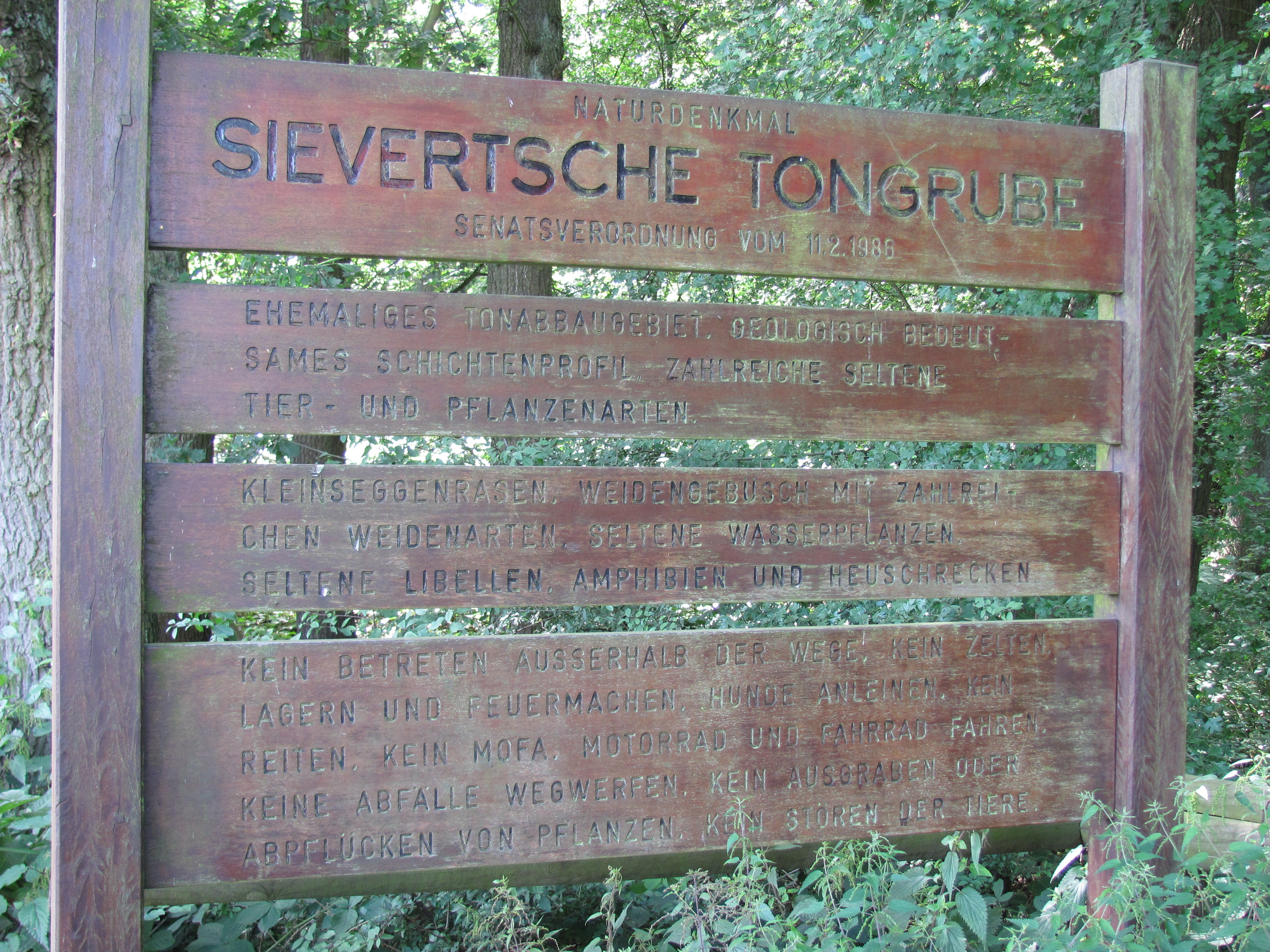 Eingang Eekbalken zur Sievertschen Tongrube